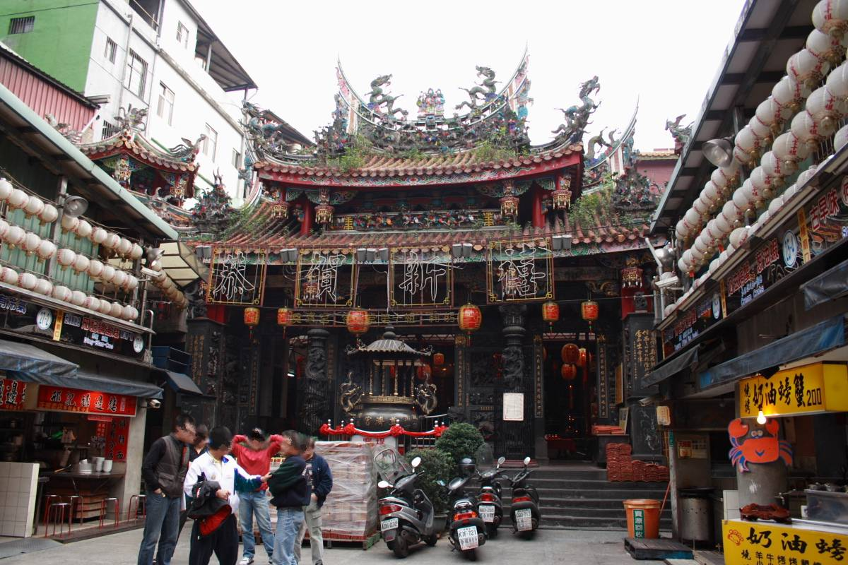 奠濟宮。